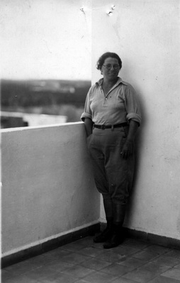 Mymon_078-3 / עדה מימון 1933 - עדה מימון